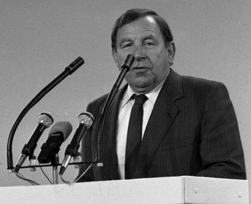 CDU Bundesparteitag Mainz 7.-8. Oktober 1986